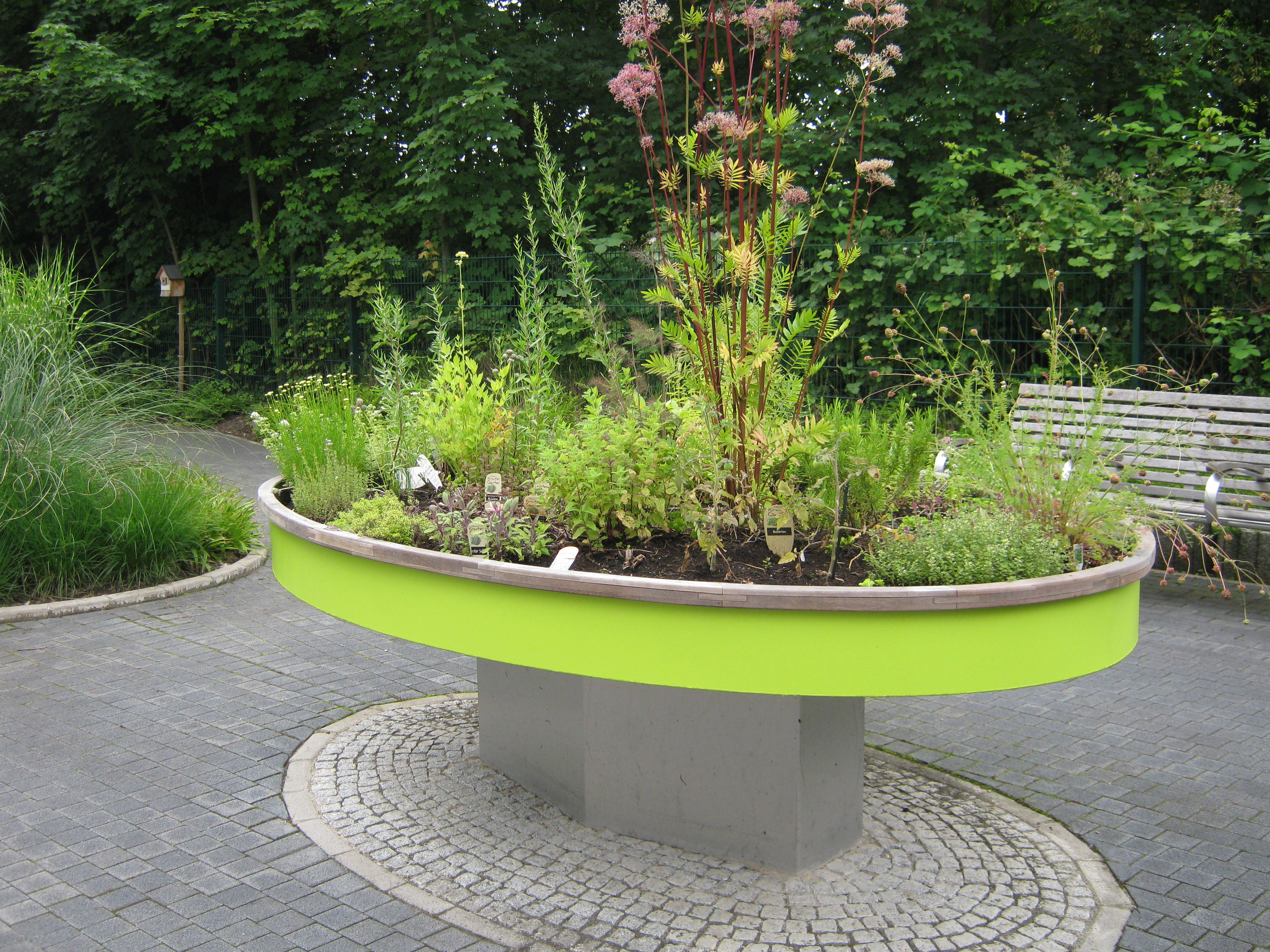 40547 Düsseldorf-Lörick; Garten der Pflegestation Haus Lörick mit Demenzgarten der planBar GmbH. Für Rollstuhlfahrer wurden diese Hochbeete, die mit Duft- und Blühpflanzen gestaltet wurden, entworfen. Aufnahme von 2016.